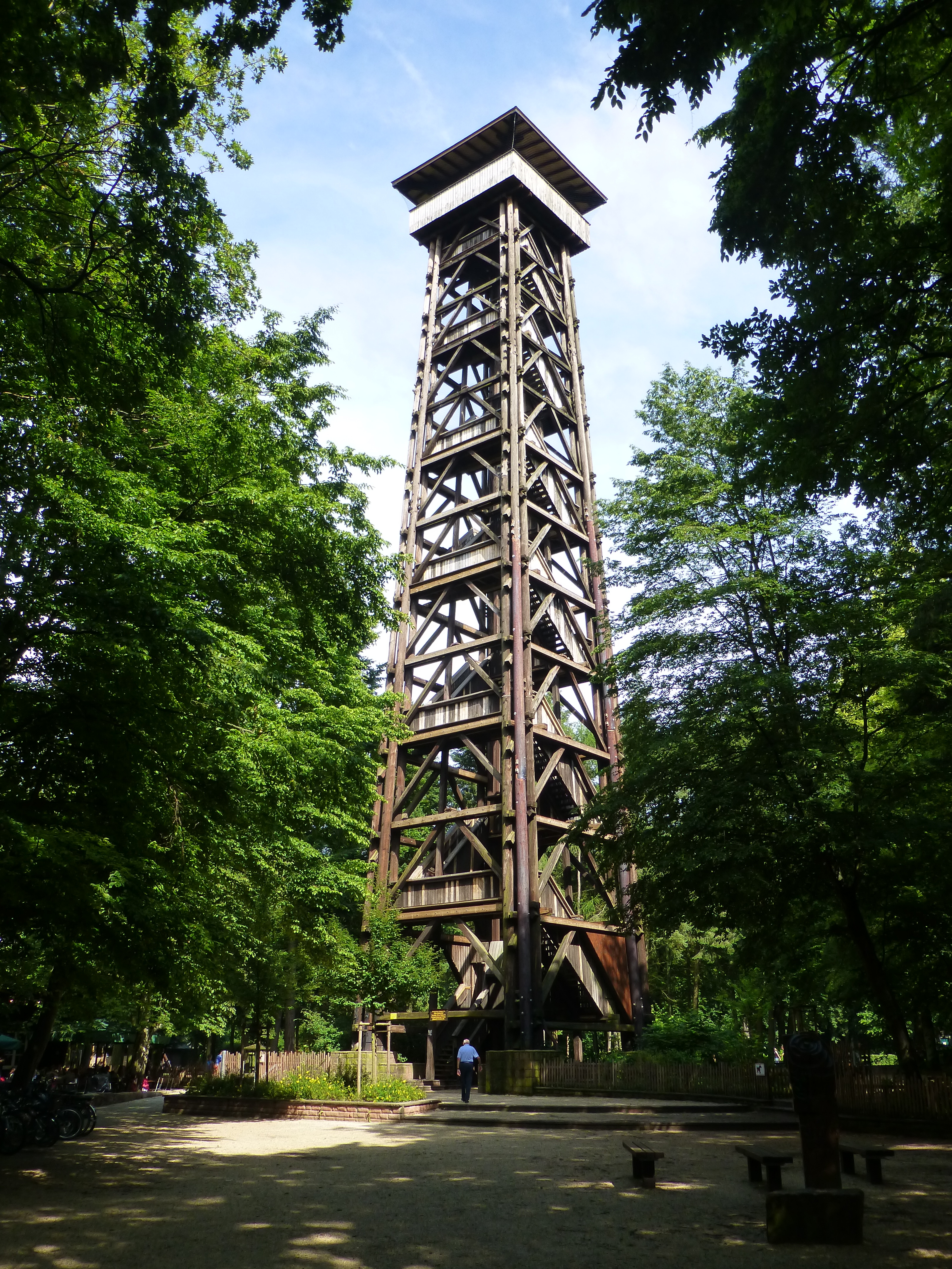 Blick ostwärts zum Goetheturm